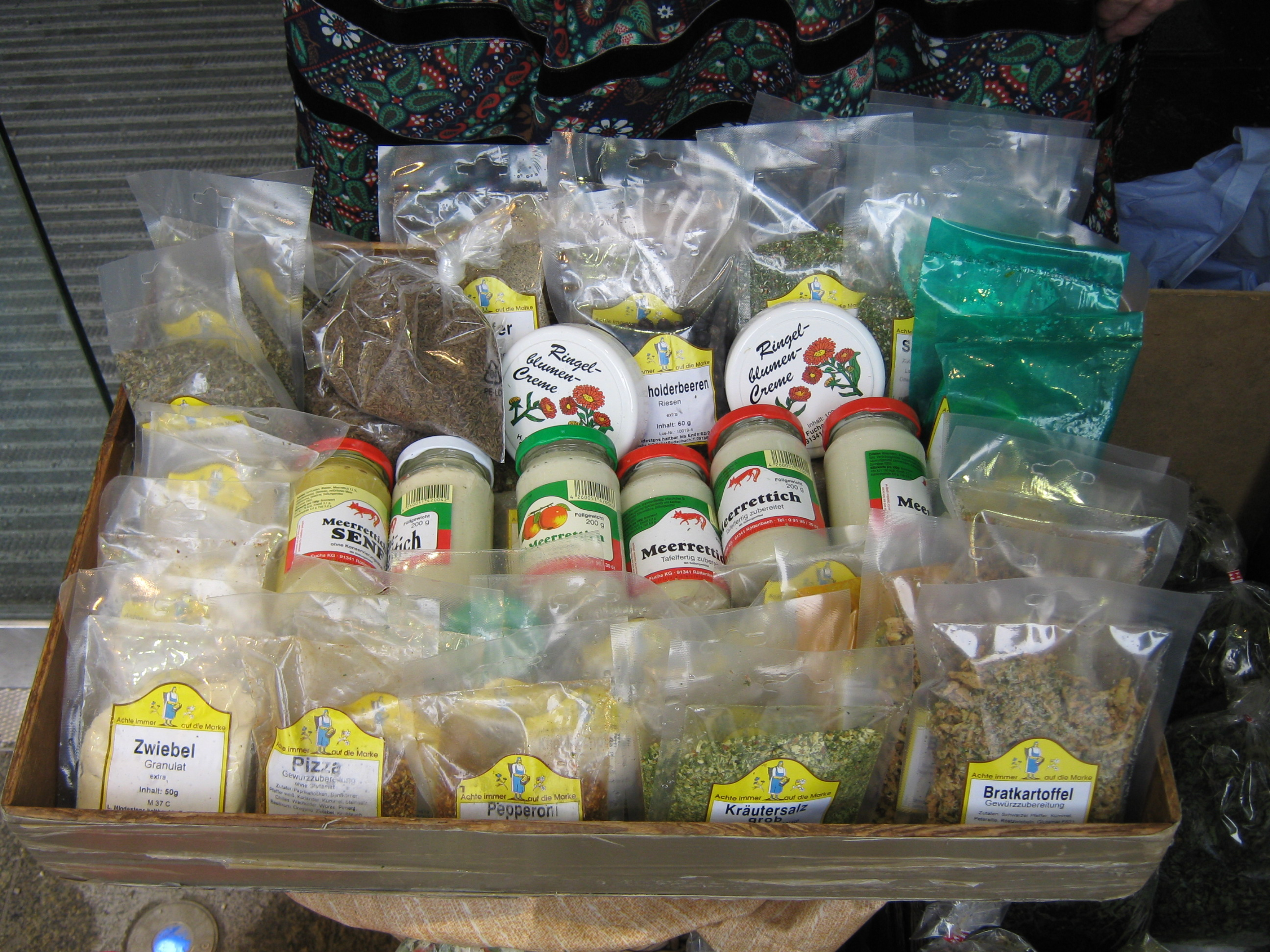 Meerrettich und andere Erzeugnisse, angeboten durch Helga Kraus am 3. März 2010, ihrem letzten Arbeitstag als letztes Krenweiberl, in München, Neuhauser Straße, rechts vor dem Eingang zum Kaufhaus Karstadt (danach abgerissen und ersetzt durch das Joseph-Pschorr-Haus)